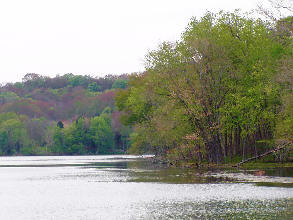 Radnor Lake in Nashville, Tennessee